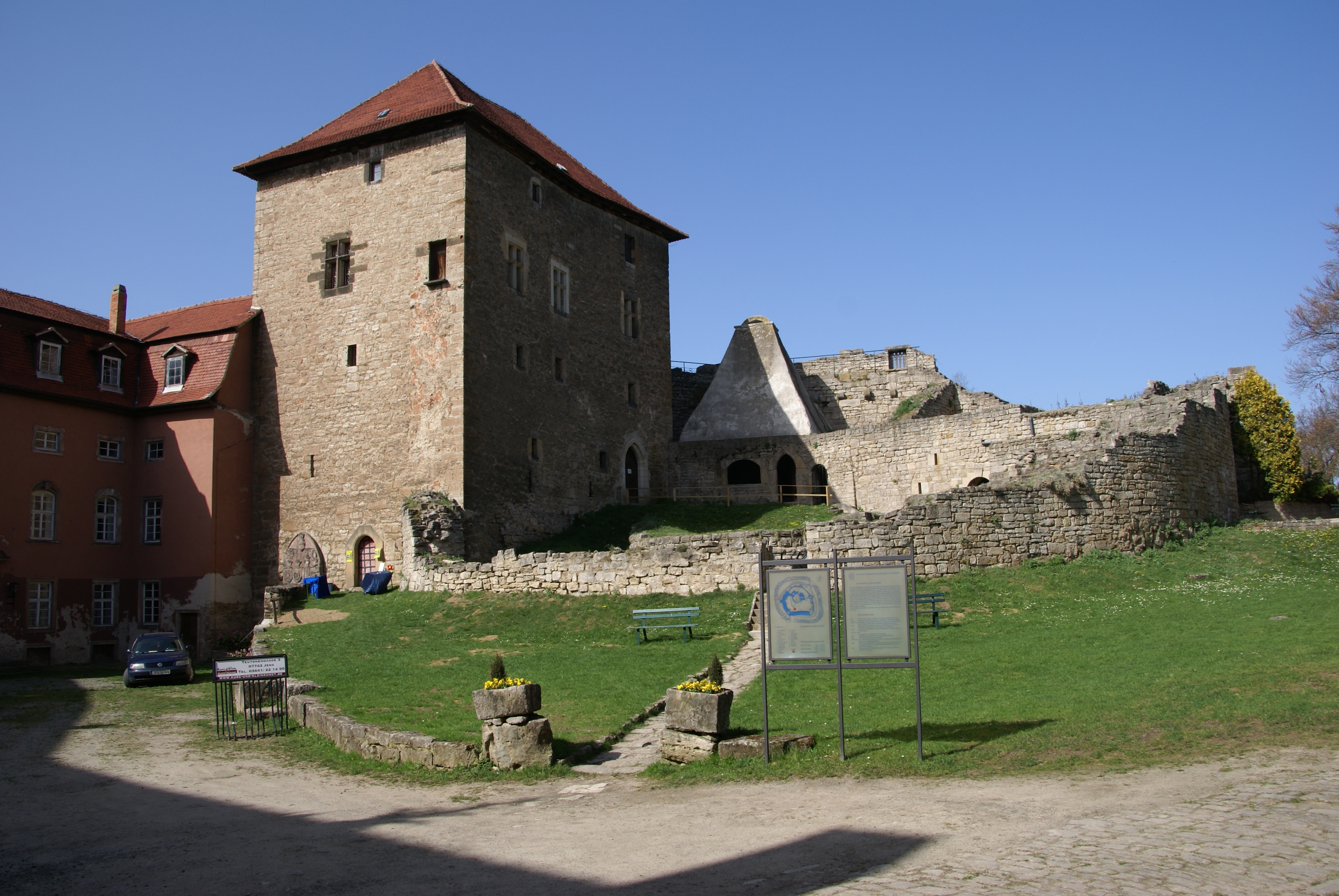 Innenhof - Wasserburg Kapellendorf - Kapellendorf, Weimarer Land, Thüringen, Deutschland